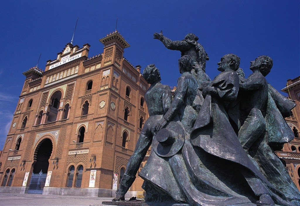 Fachada de la plaza de toros de Las Ventas con la estatua a homenaje a Antonio Bienvenida en primer plano. La estatua representa al matador de toros saliendo a hombros por la puerta grande. Es obra del escultor Luís A. Sanguino.